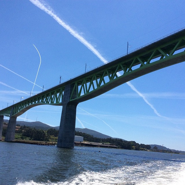 Catoira.Puente AVE.Translatio -peregrinos por el Ulla desde Vilanova